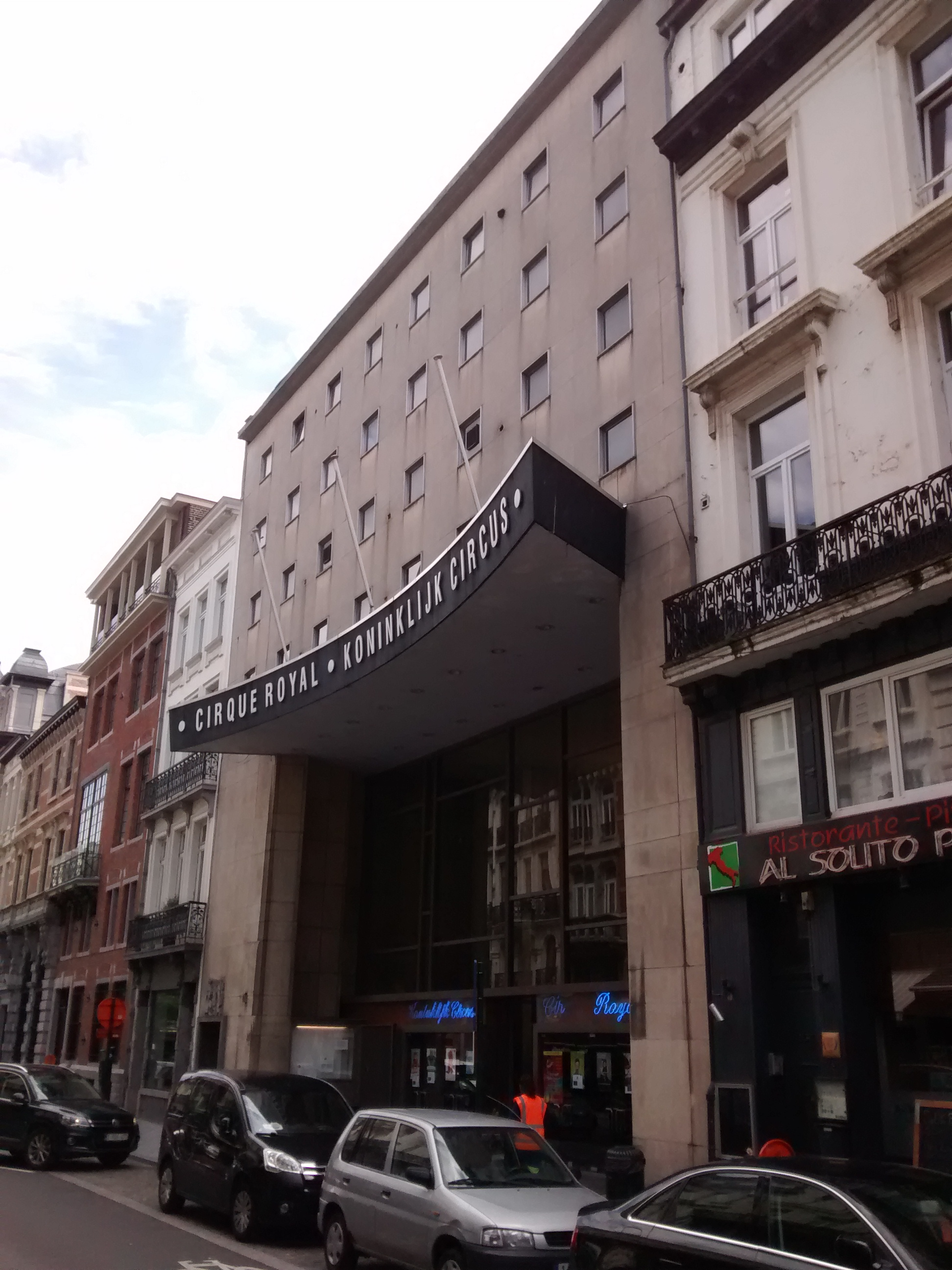 Cirque Royal, Brussels, Belgium.